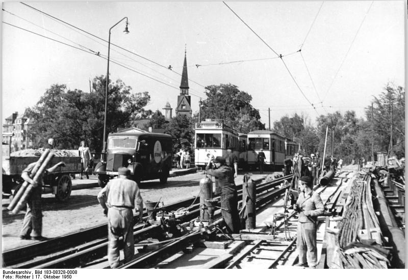 ADN-ZB-Richter 17.10.1950 Berlin-Köpenick Köpenick, ein Ort an der Mündung von Dahme und Spree östlich von Berlin, wurde 1920 der 6. Verwaltungsbezirk Gross-Berlins. Zwei grosse Brücken, nur wenige hundert Meter voneinander entfernt, verbinden die einzelnen Stadtteile. Faschisten sprengten beide in die Luft und zerrissen damit buchstäblich die Stadt. An beide Brücken wird heute noch gebaut, hier die Dammbrücke.